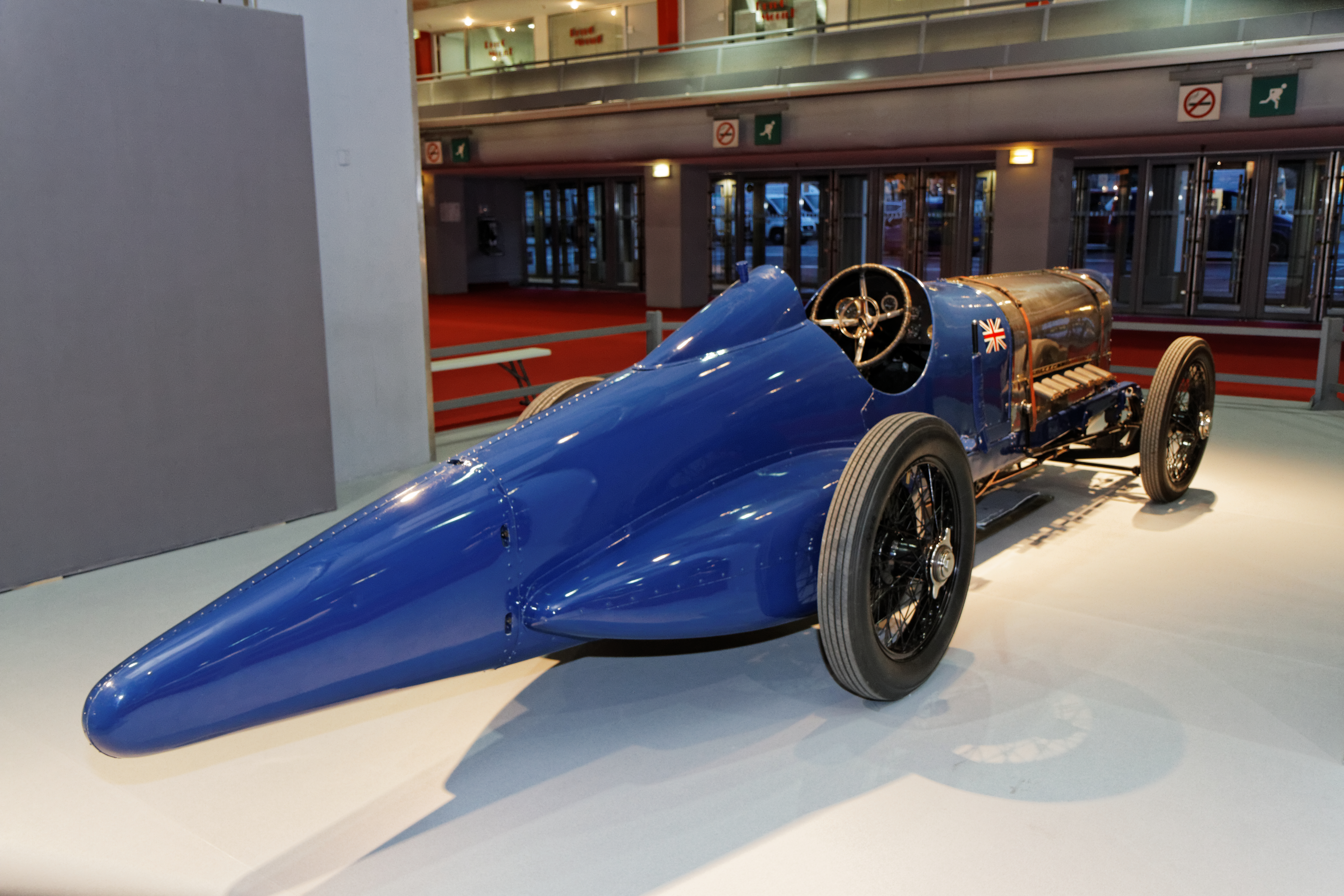 La Sunbeam 350cv exposée lors du salon Retromobile 2014